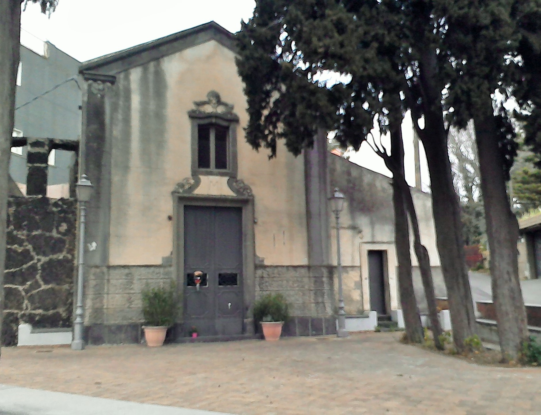 Chiesa della Madonna degli Ammalati - Misterbianco